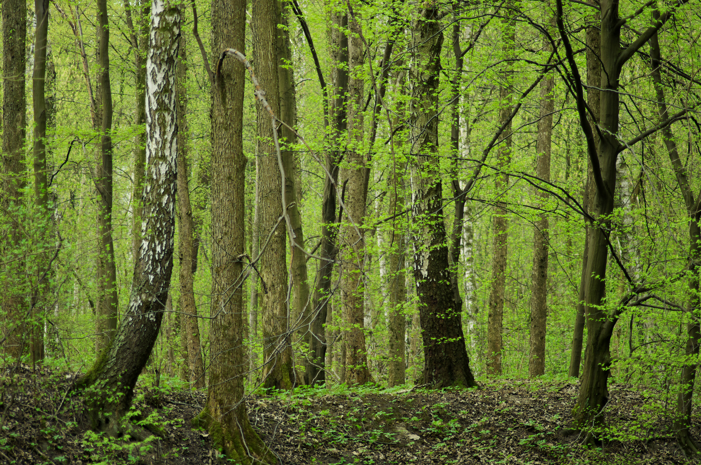 Grąd złożony z grabu, wiązu, dębu i brzozy